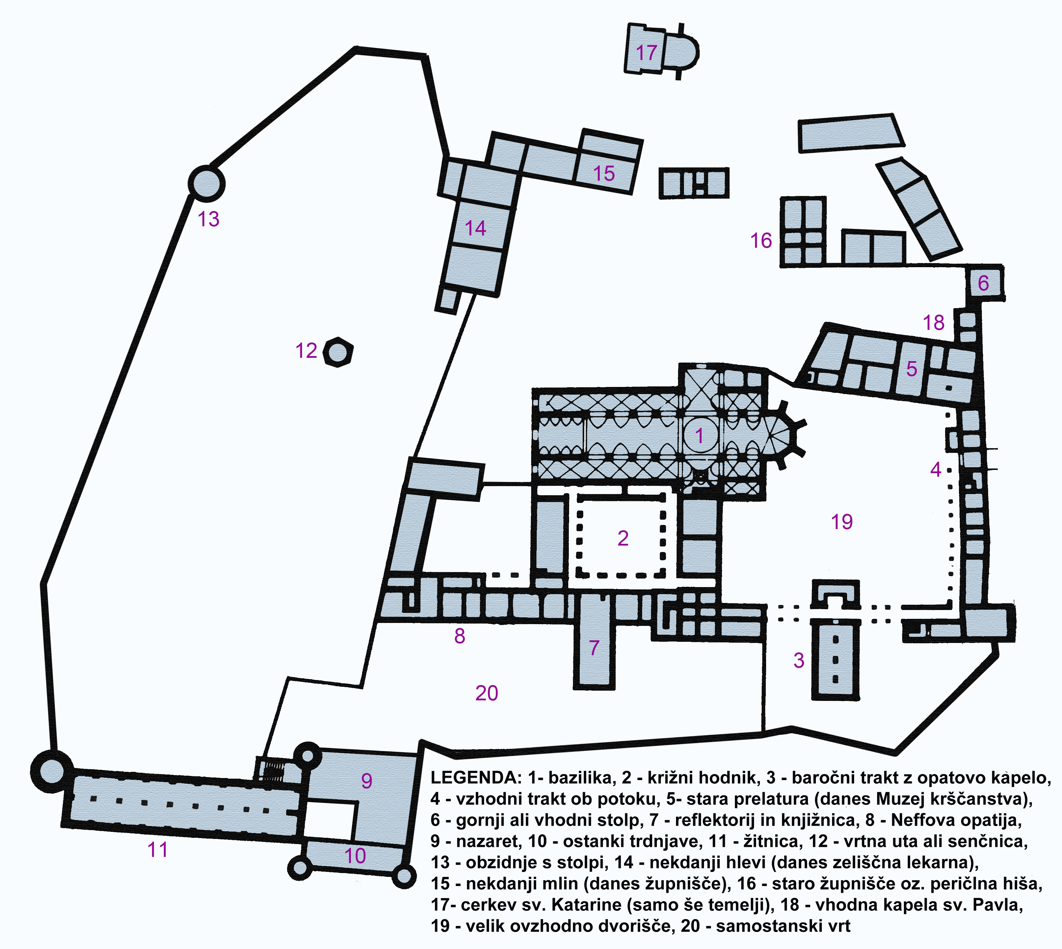 Cistercijanska opatija Stična - tloris